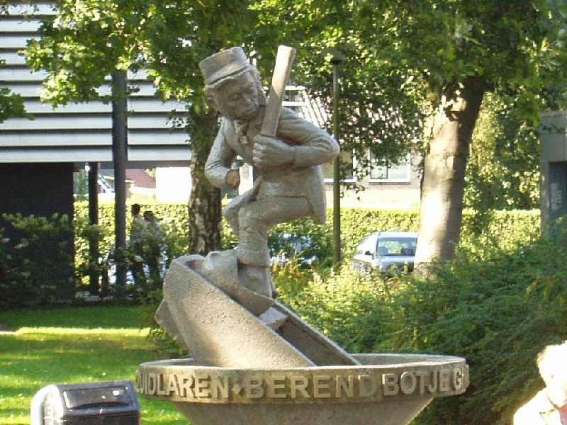 Het beeld van Berend Botje in Zuidlaren, door W.R. Pot in 1967